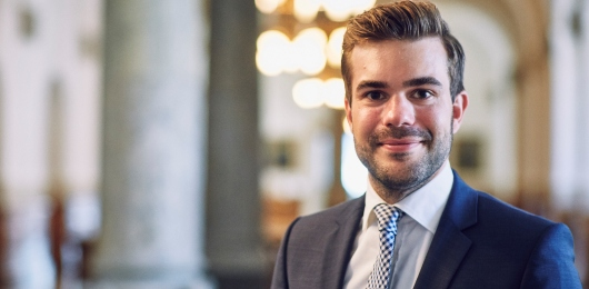 Mads Rørvig